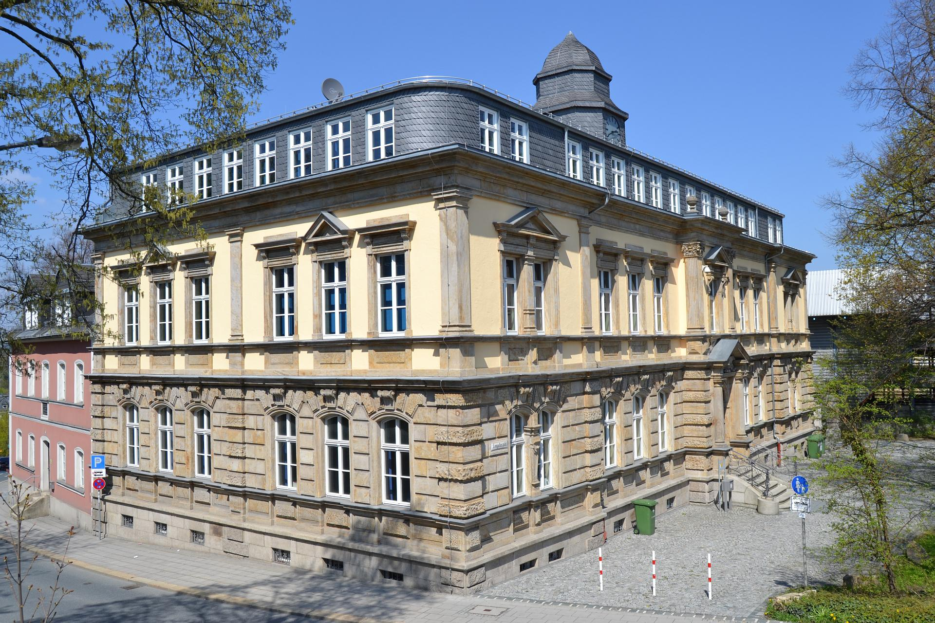 Schulgebäude am Logoliusplatz mit Nachbarhaus in der Lessingstraße. Ursprünglich erbaut für das Städtische Mädchengymnasium; später genutzt für die Volkshochschule Hof-Stadt; nun Berufsoberschule u. Fachoberschule